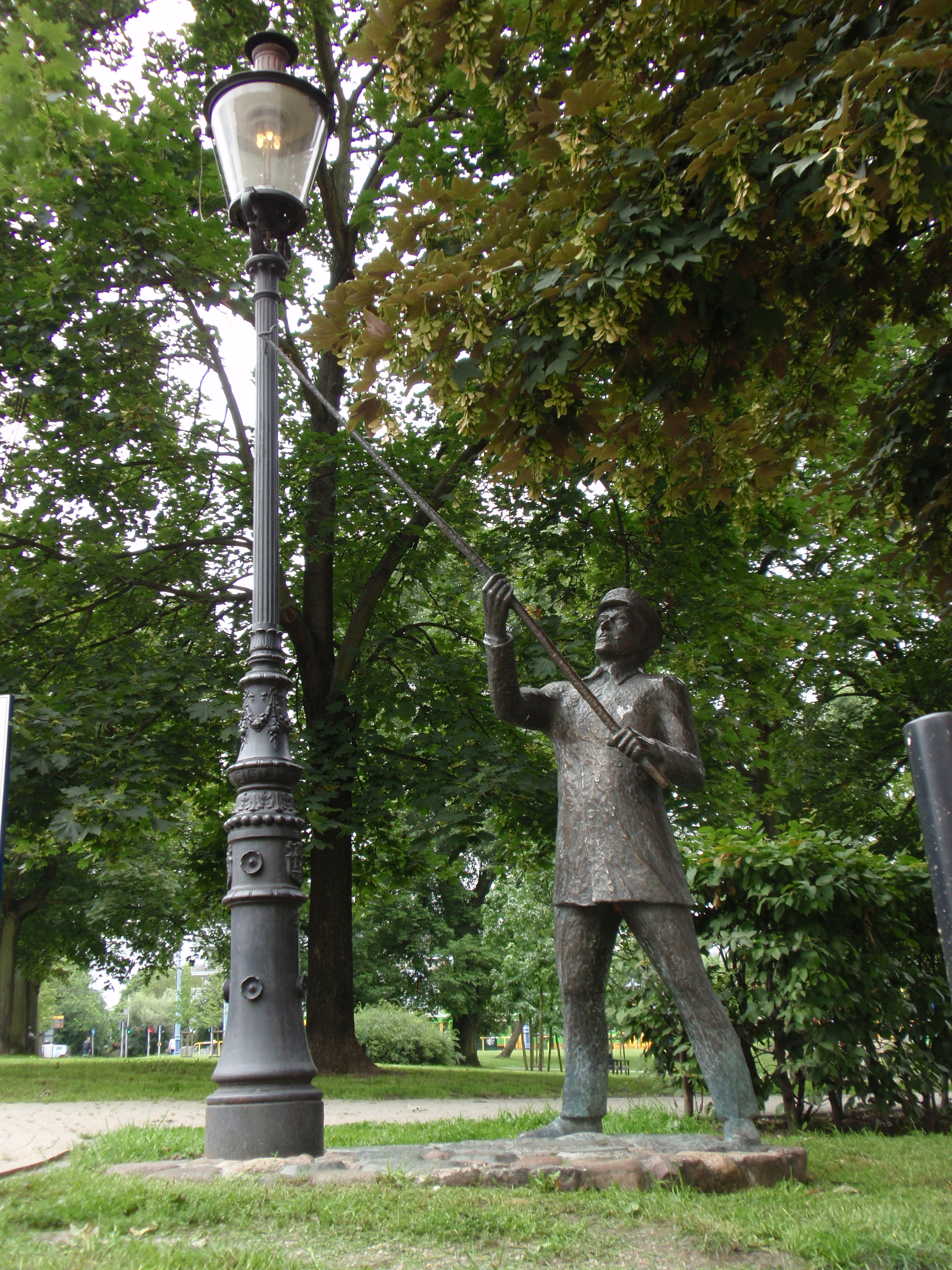 Zyga Latarnik - pomnik w Poznaniu, rok powstania: 2003, autor: Robert Sobociński, współrzędne geograficzne: 52.4037285"N 16.9425363"E